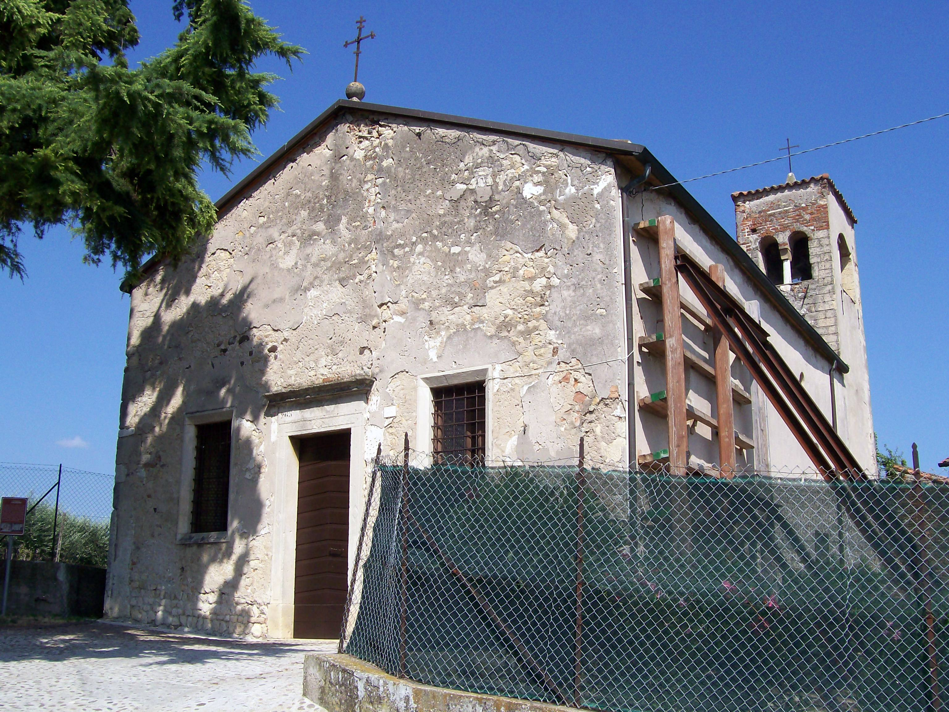 Chiesetta di S. Pietro in Caldiero.